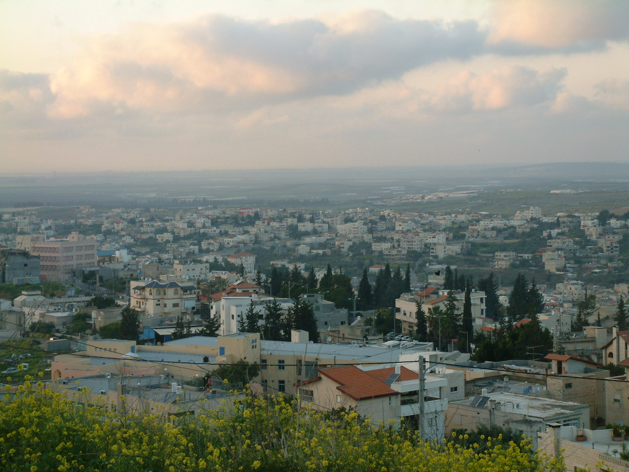 מראה העיר שפרעם, צילום משכונת דהר אלכניס